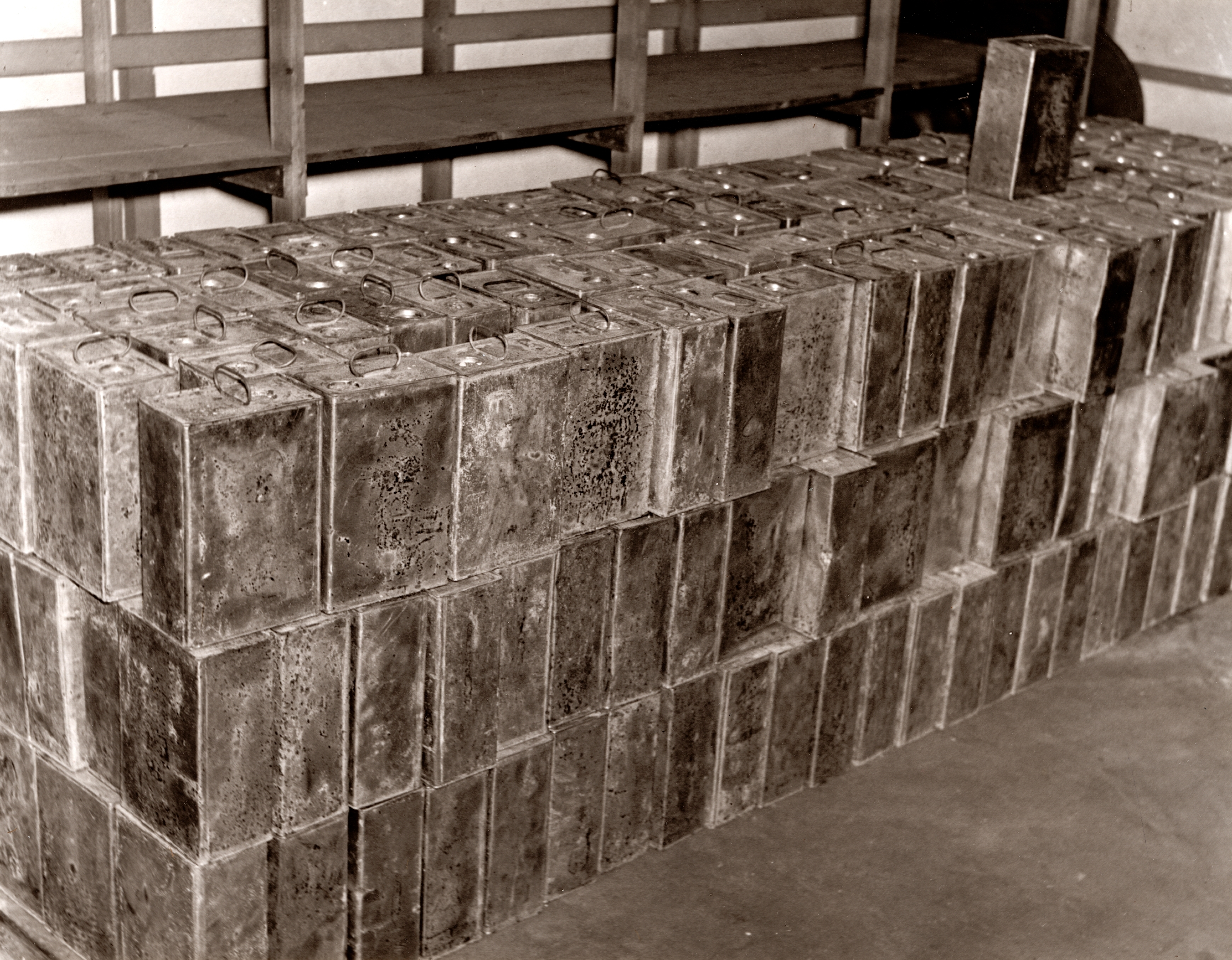 TEKA0122759 Bild från spritsmuggleriets område. 300damejeanner á 10 liter, beslagtagna vid Torö den 9,4 1939.